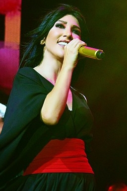 Hande Yener, Harbiye Cemil Topuzlu Açıkhava Tiyatrosu'nda sahnede.